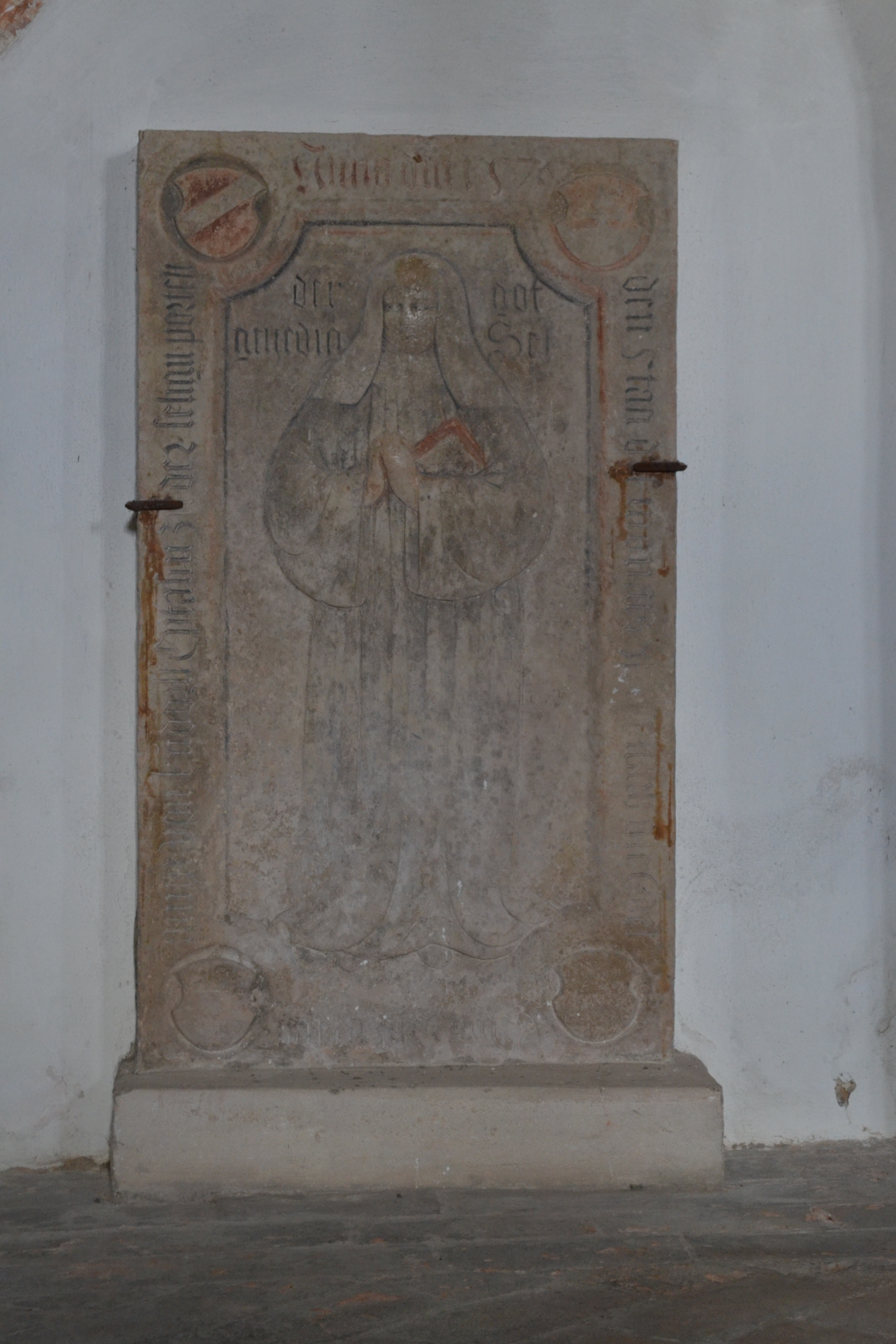 Die Grabplatte der Anna von Kühedorf befindet sich in der Klosterkirche zu Seligenporten